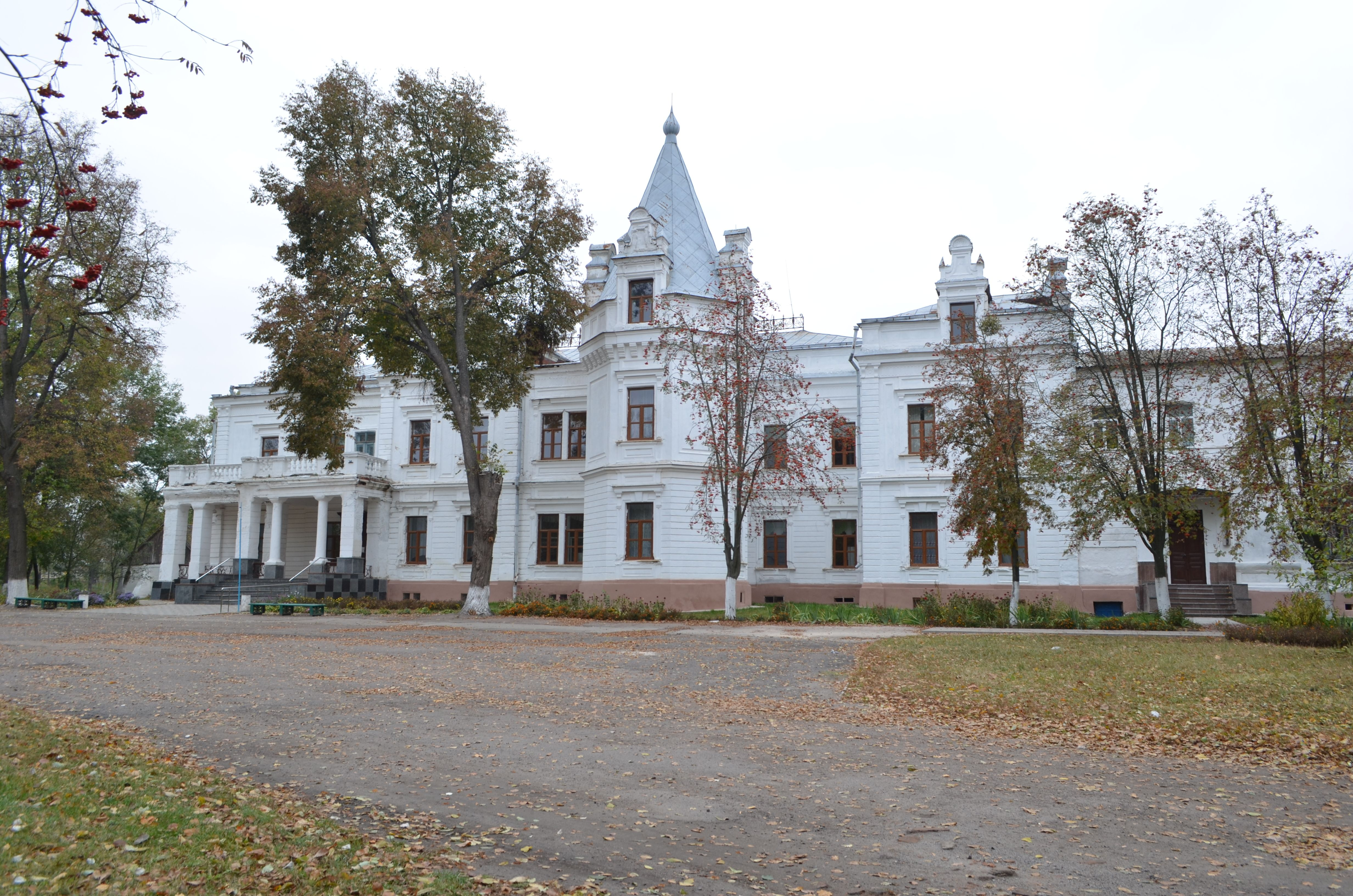 Палац (мур.), Андрушівка, вул.Леніна, 28